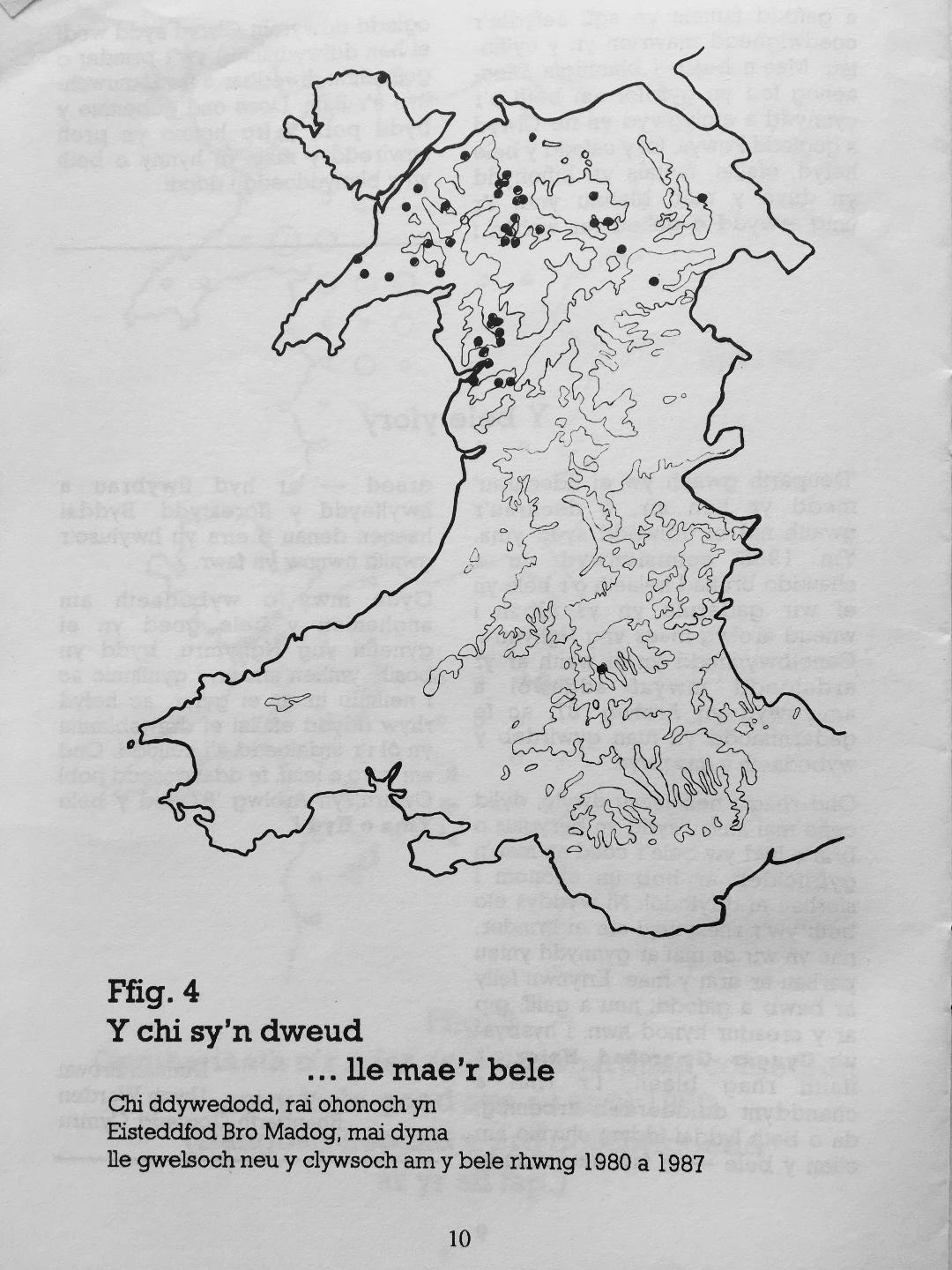 map yn dangos dosbarthiad y bele goed yng Nghymru yn ol arolwg 1987